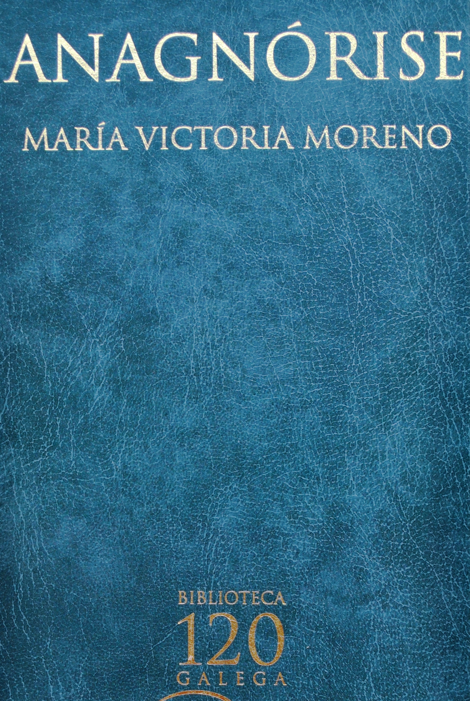 Detalle da portada dun volume de Anagnórise, da Biblioteca Galega 120.